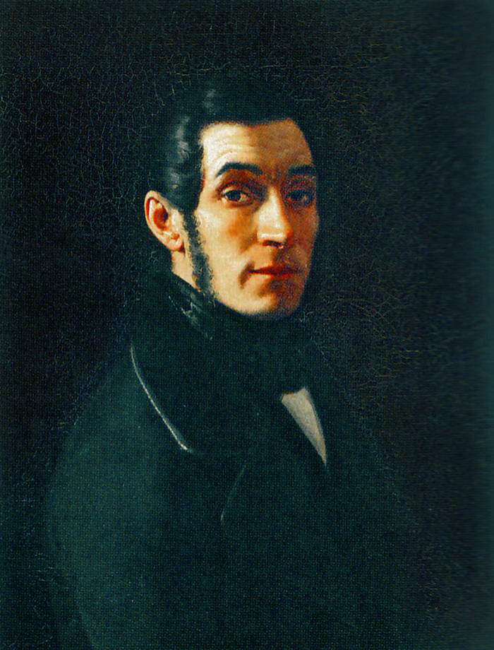 Портрет Фёдора Ивановича Иноземцева